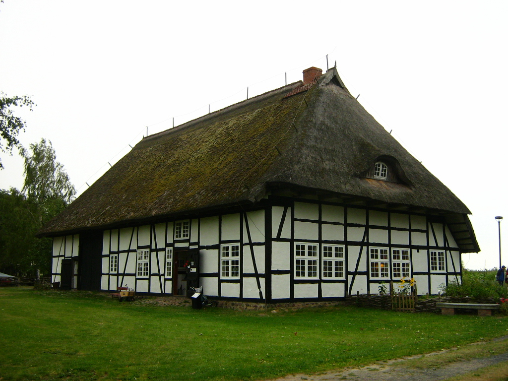 Zwei-Ständer-Fachwerkhaus im Freilichtmuseum Klockenhagen, Ribnitz-Damgarten im Landkreis Vorpommern-Rügen, Mecklenburg. Dieses Haus stammt von 1671 und stammt aus Strassen im Landkreis Ludwigslust. Wohnhaus bis 1914, danach Wirtschaftsgebäude